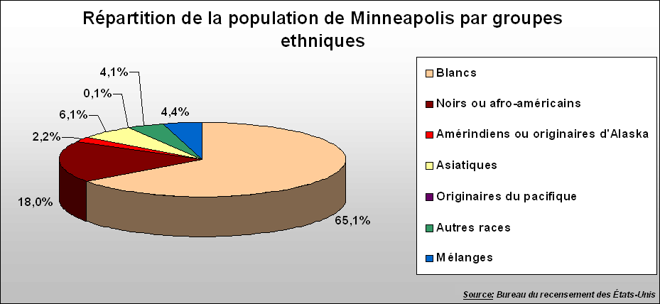 Camembert de la répartition ethnique de Minneapolis, Minnesota, USA